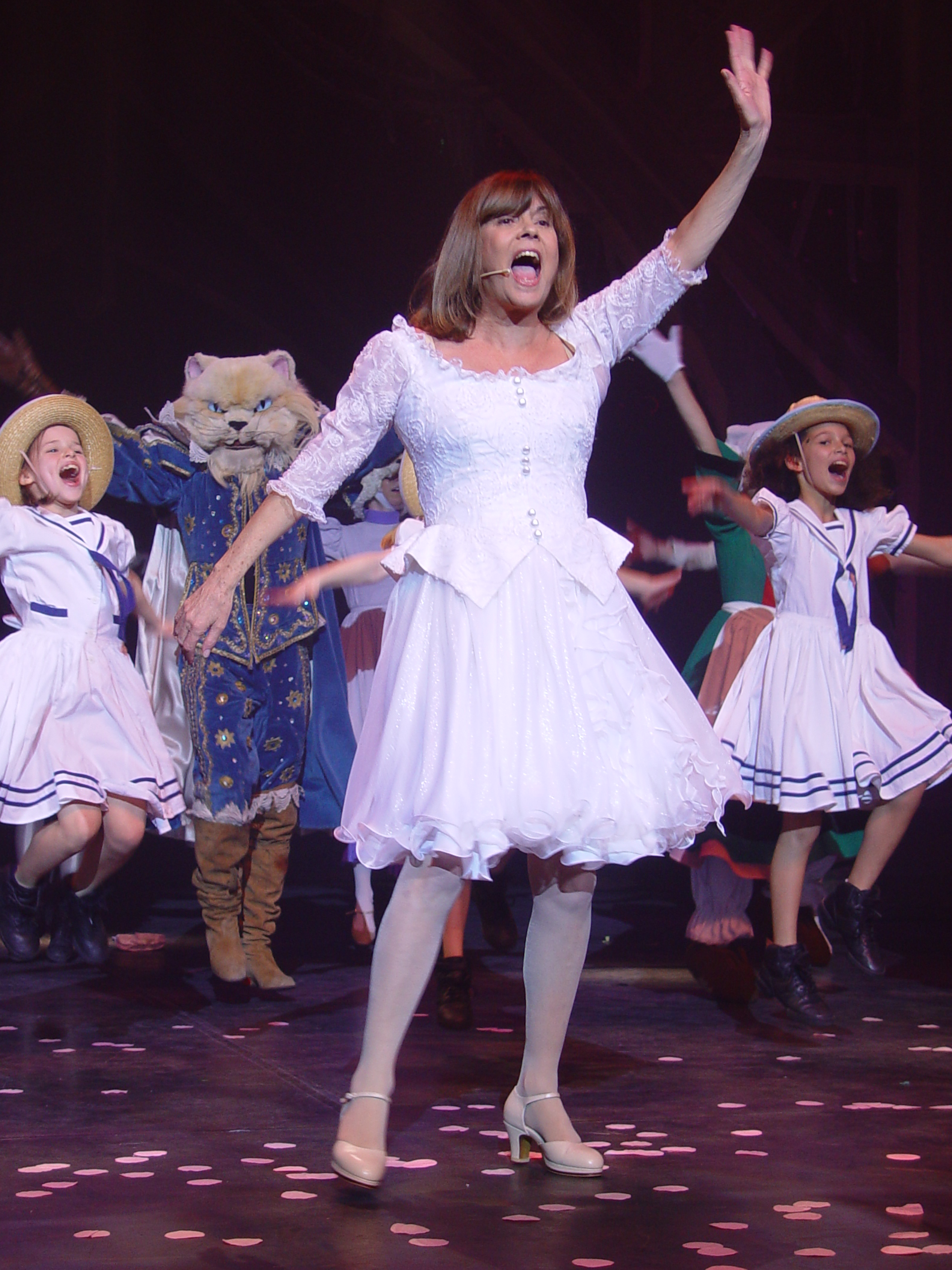 finale spectacle 2007, photo prise par Michaël Bemelmans.